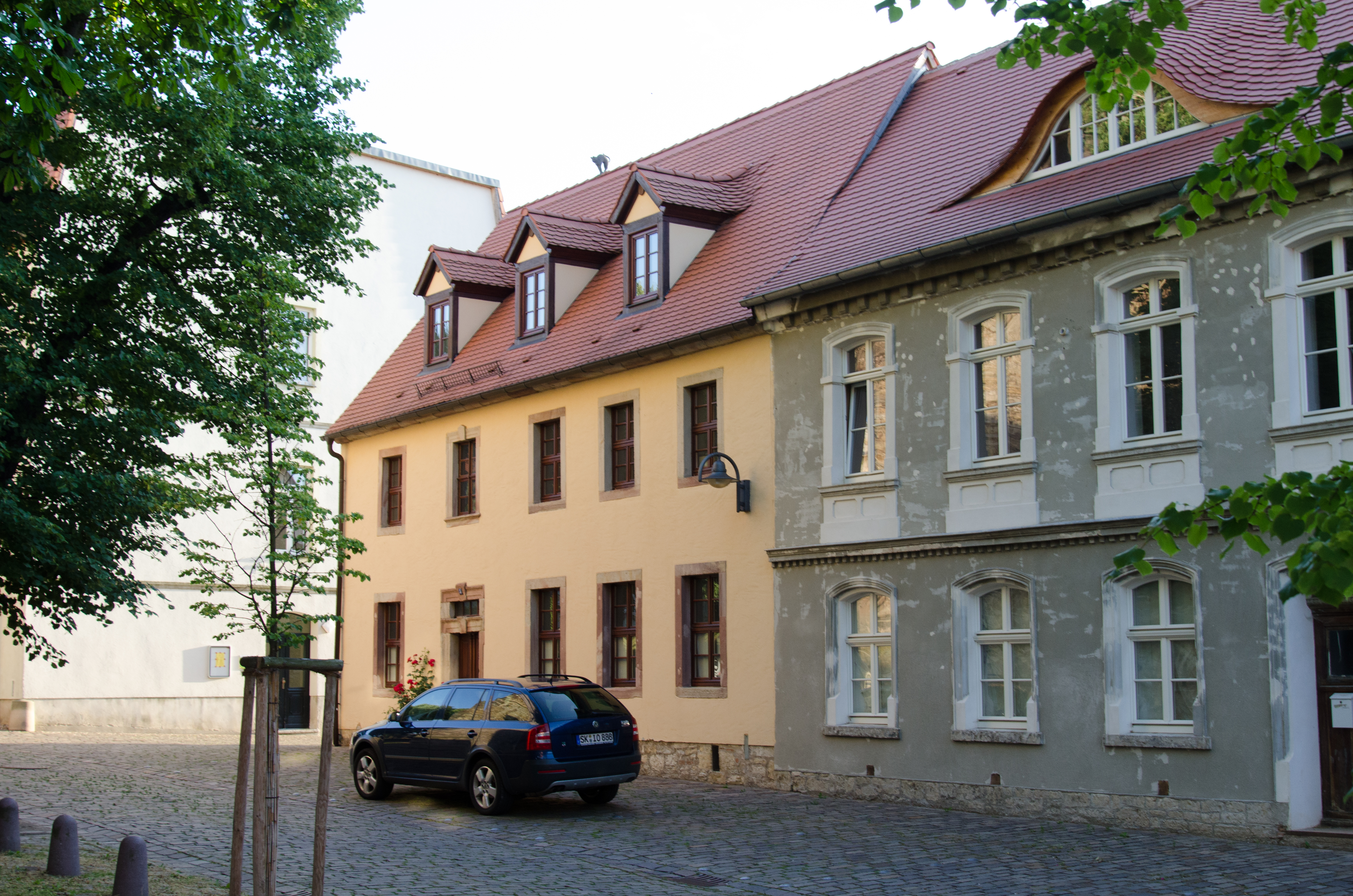 Querfurt, Kirchplan 5